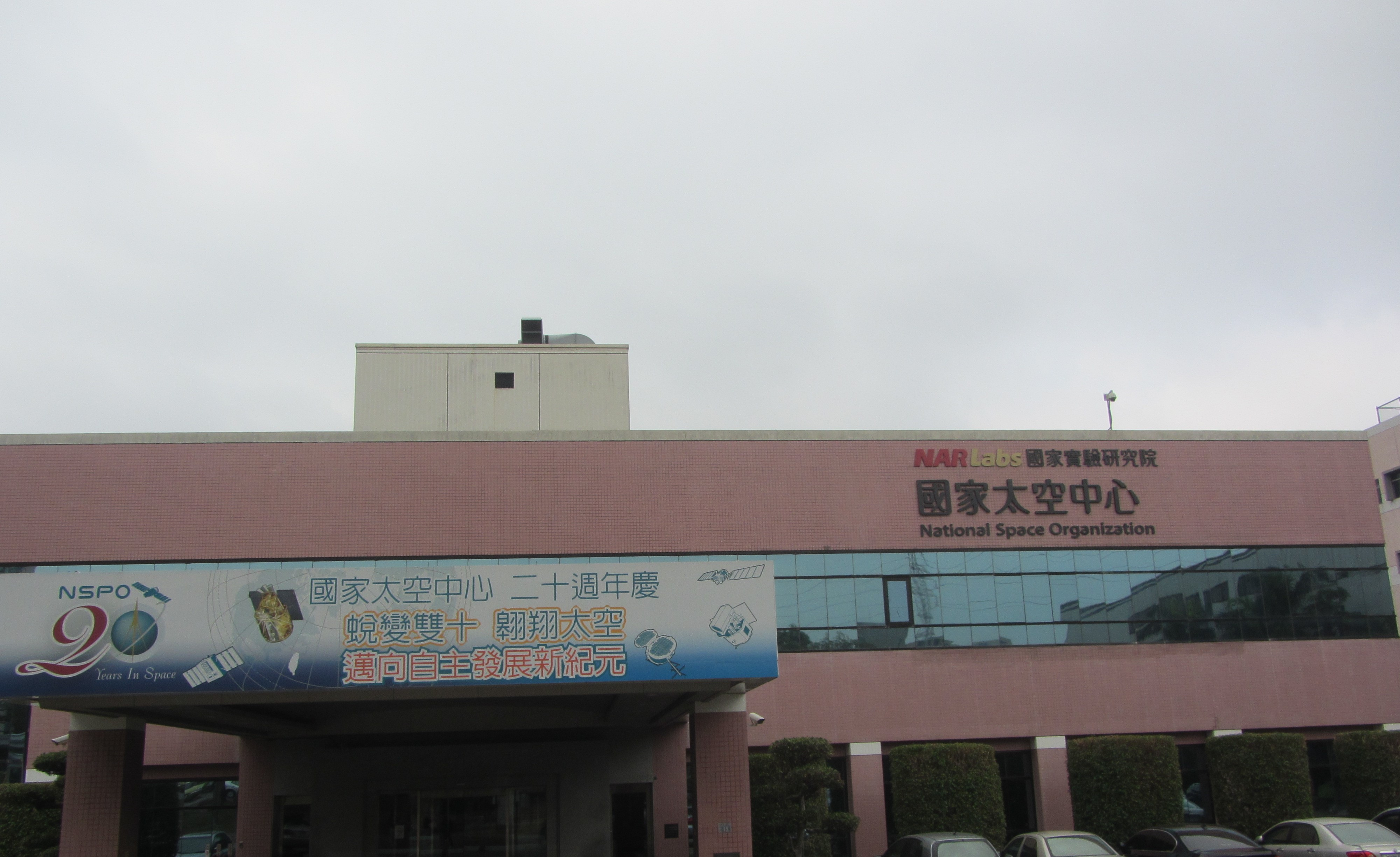 中華民國財團法人國家實驗研究院國家太空中心衛星整合測試廠房，位於新竹科學工業園區內。